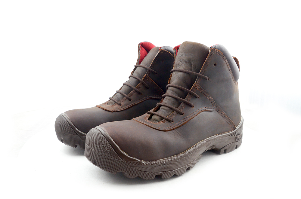 Ejemplo de calzado de seguirdad